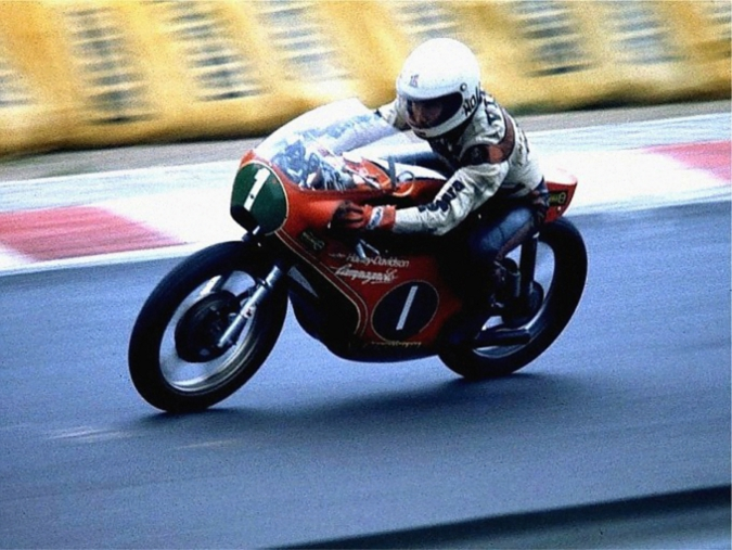 Walter Villa auf Harley-Davidson (Aermacchi), 250 cm³ beim Training zum Großen Preis von Deutschland auf dem Nürburgring